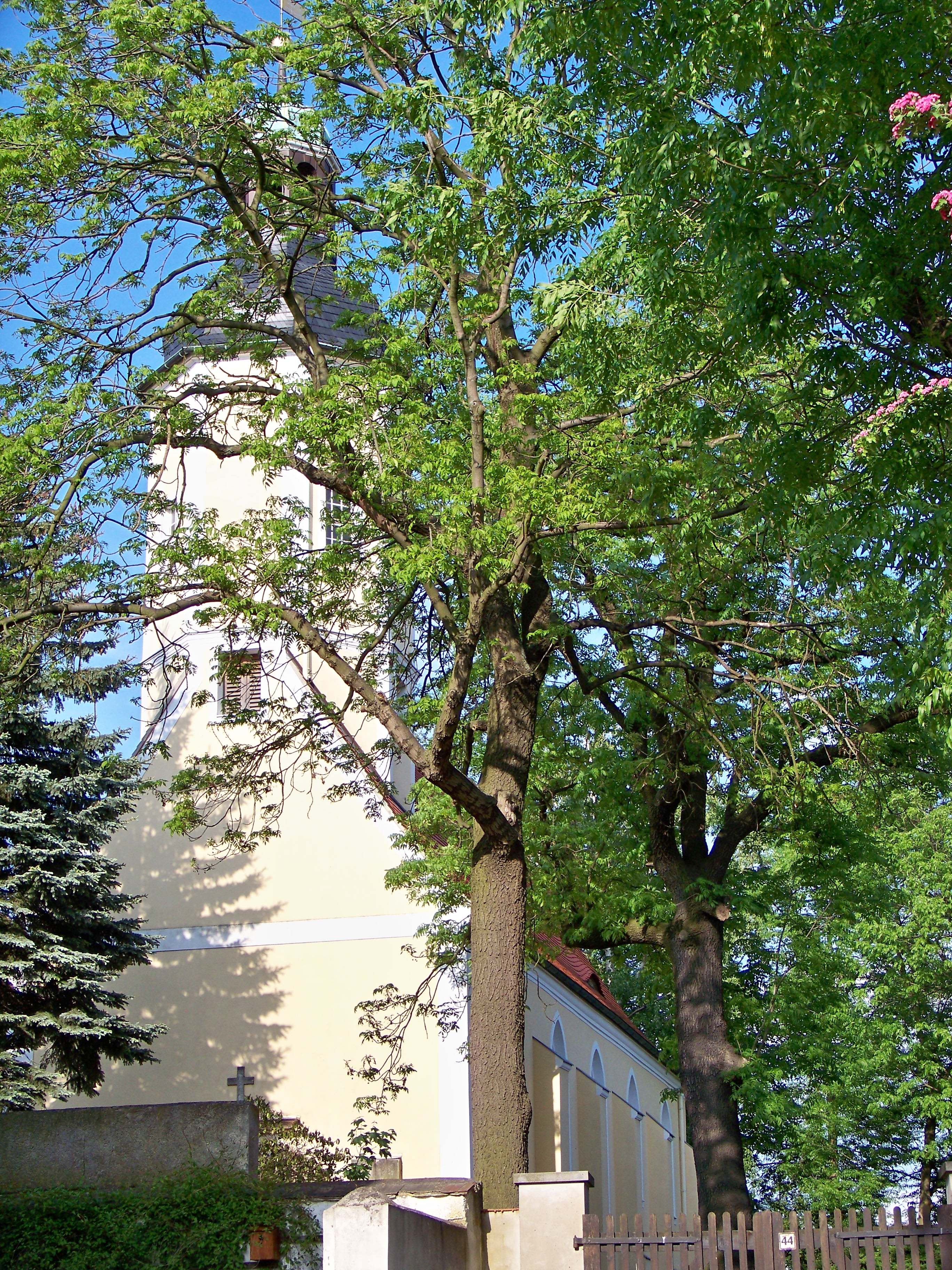 Kirche in Störmthal/Sachsen/Landkreis Leipziger Land/Gemeinde Großpösna